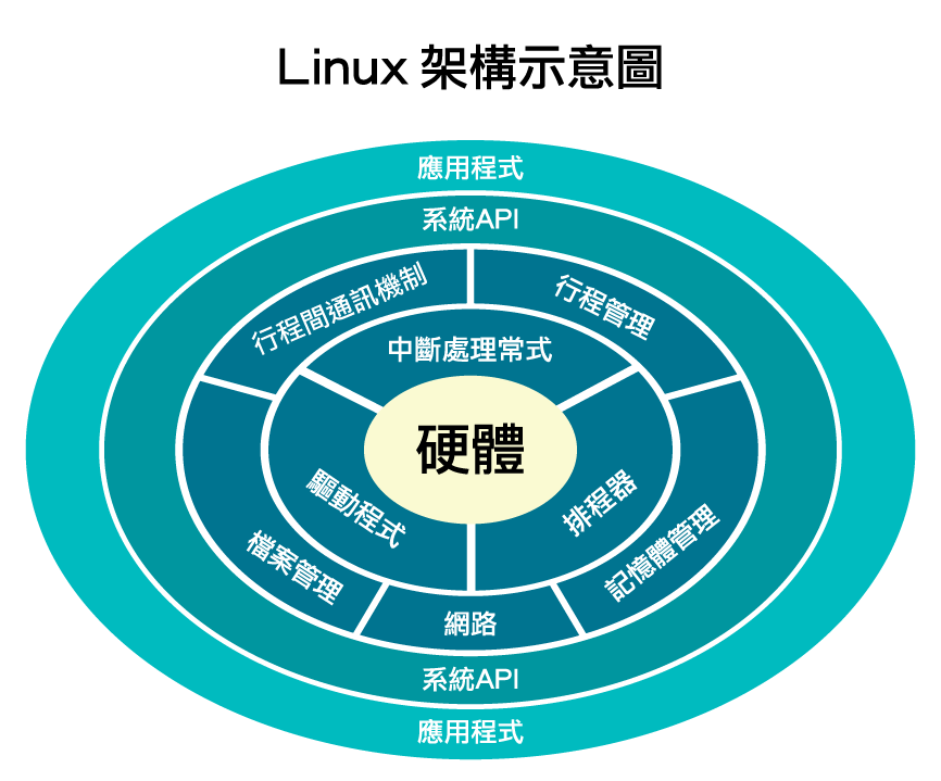 Linux 系統的架構示意圖。